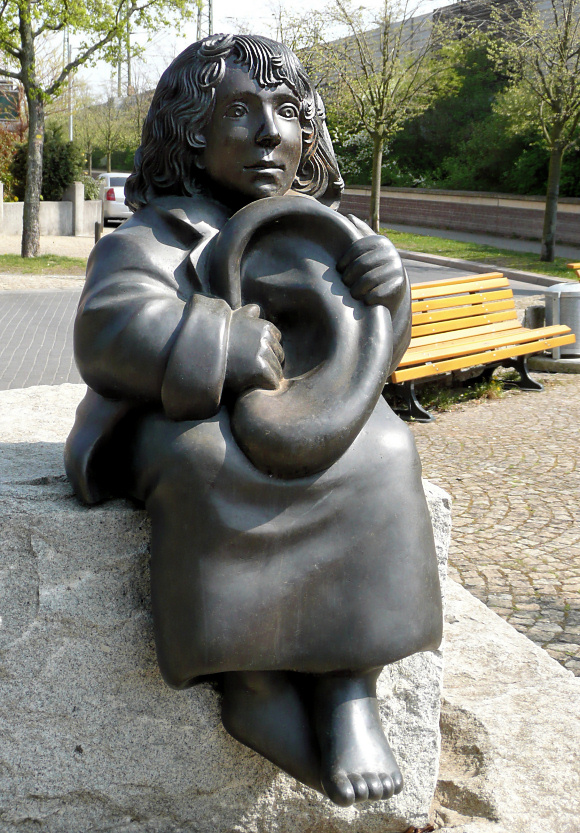 Momo Figur in Hannover; Michael-Ende-Platz; Ecke Lönsstraße, Ellernstraße, Kleefelder Straße